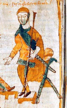 Pépin d'Italie. Copie réalisée au Xe siècle d'un manuscript original des annales de Fulda datant d'entre 829 et 836 pour Évrard de Frioul.